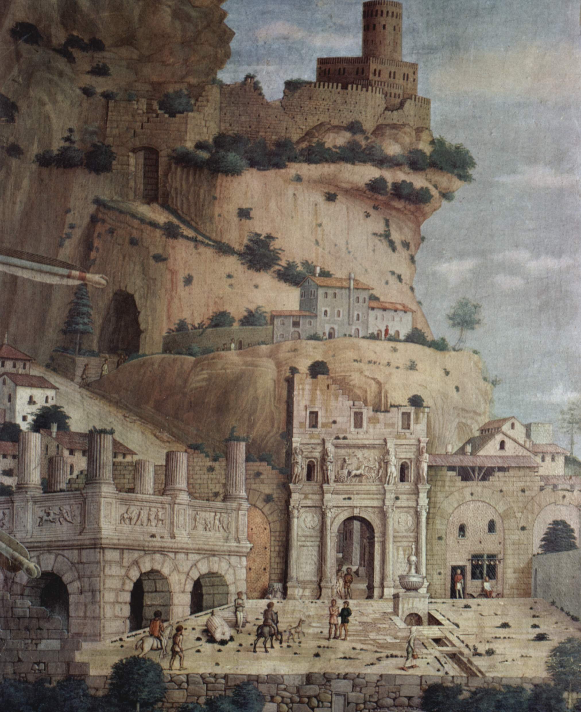 detail: Ruinenarchitektur